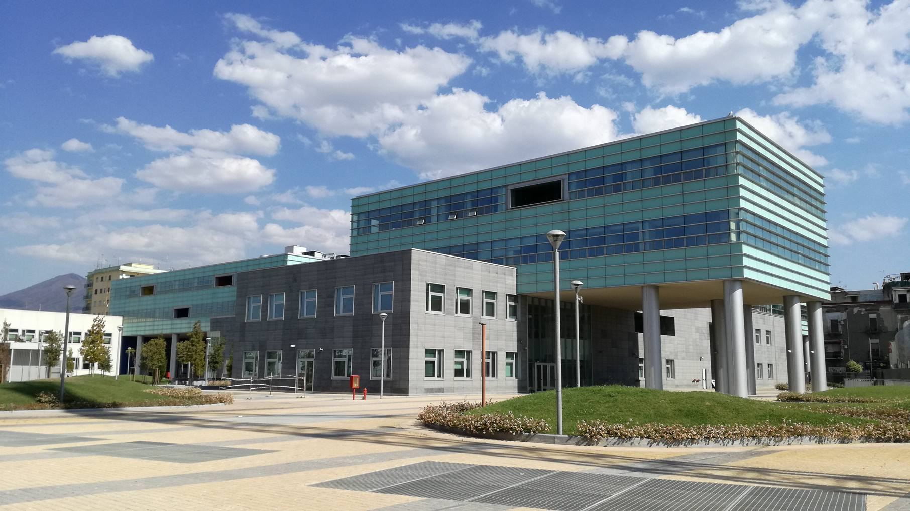 Apple Developer Academy